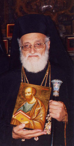 Patriarc Gregorio III Laham